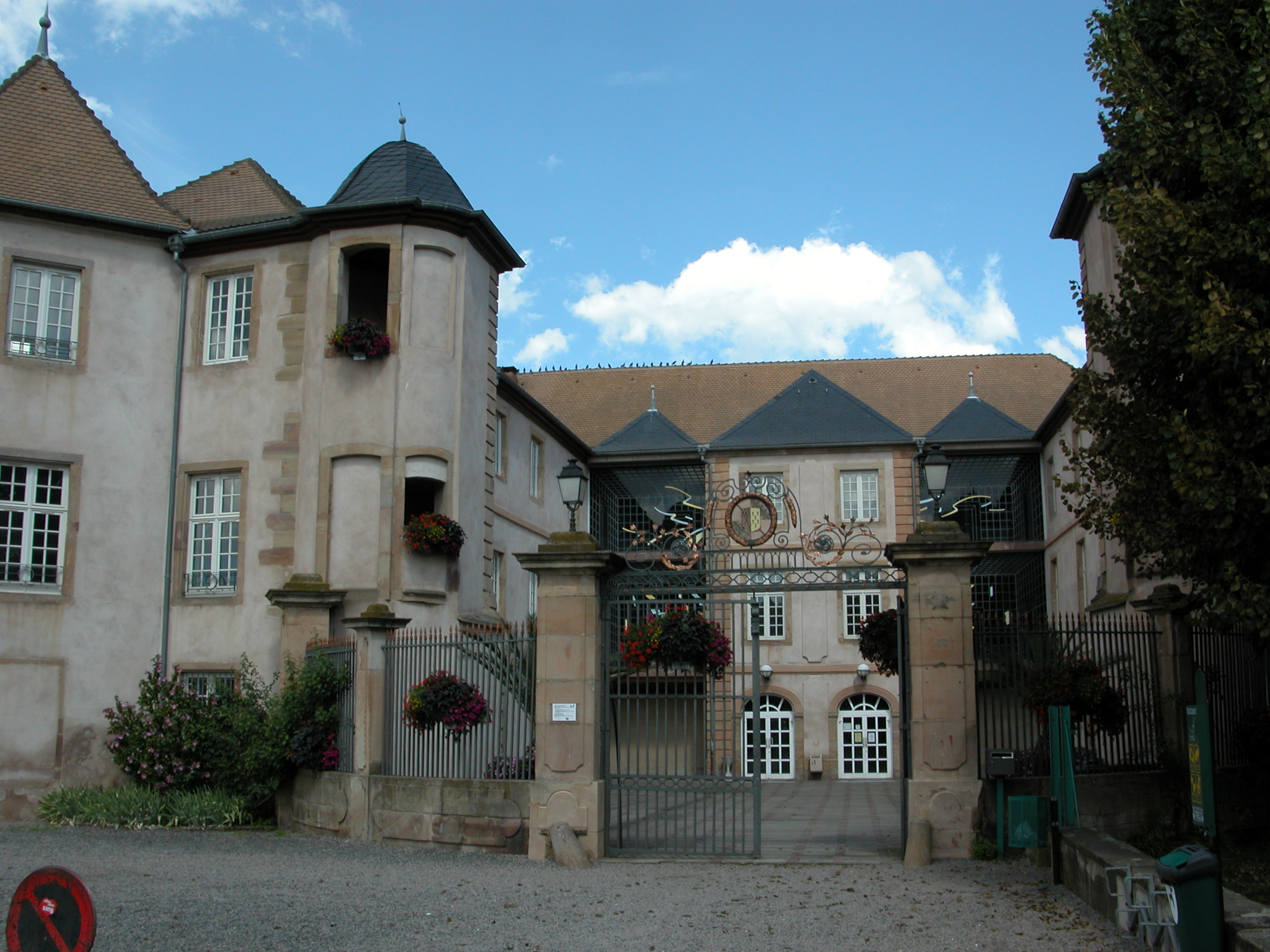 Château des Rohan à Mutzig, Bas-Rhin